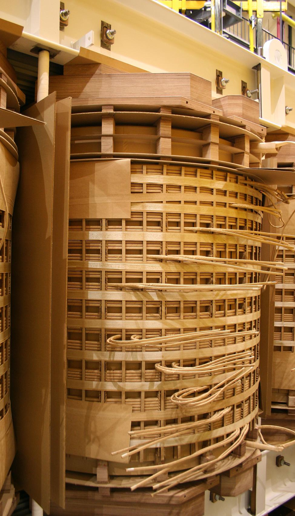 Een vermogentransformator wikkeling